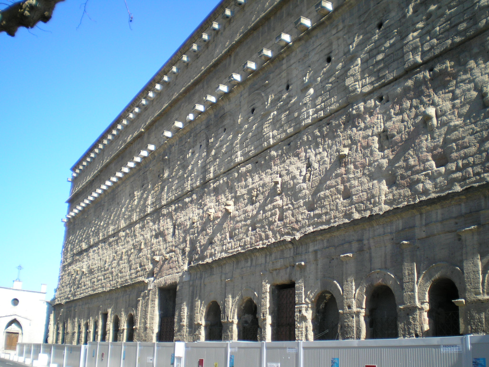 Orange (Vaucluse) - Mur du théâtre